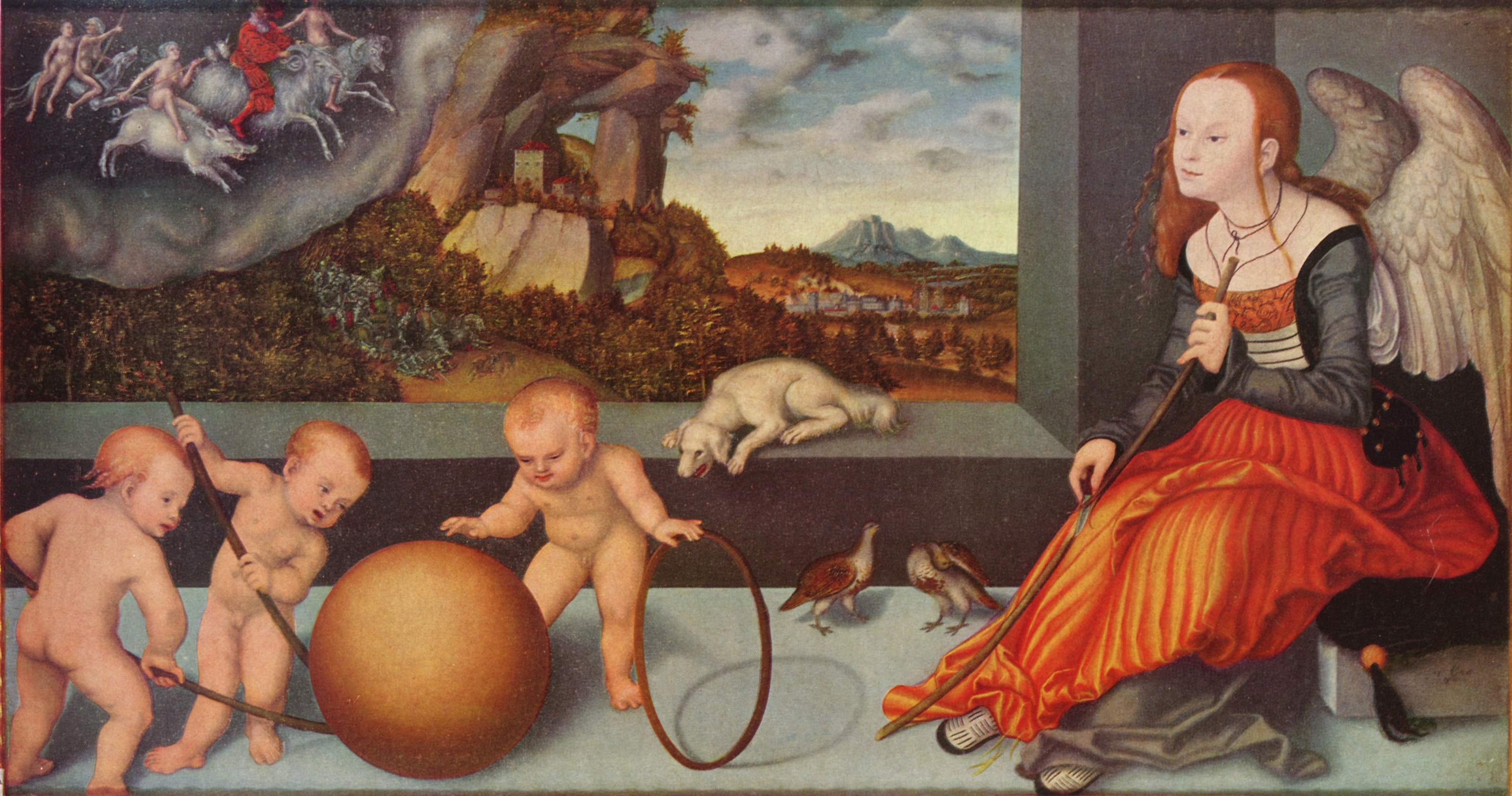 Melancholialabel QS:Lda,"Melankolien"label QS:Len,"Melancholia"